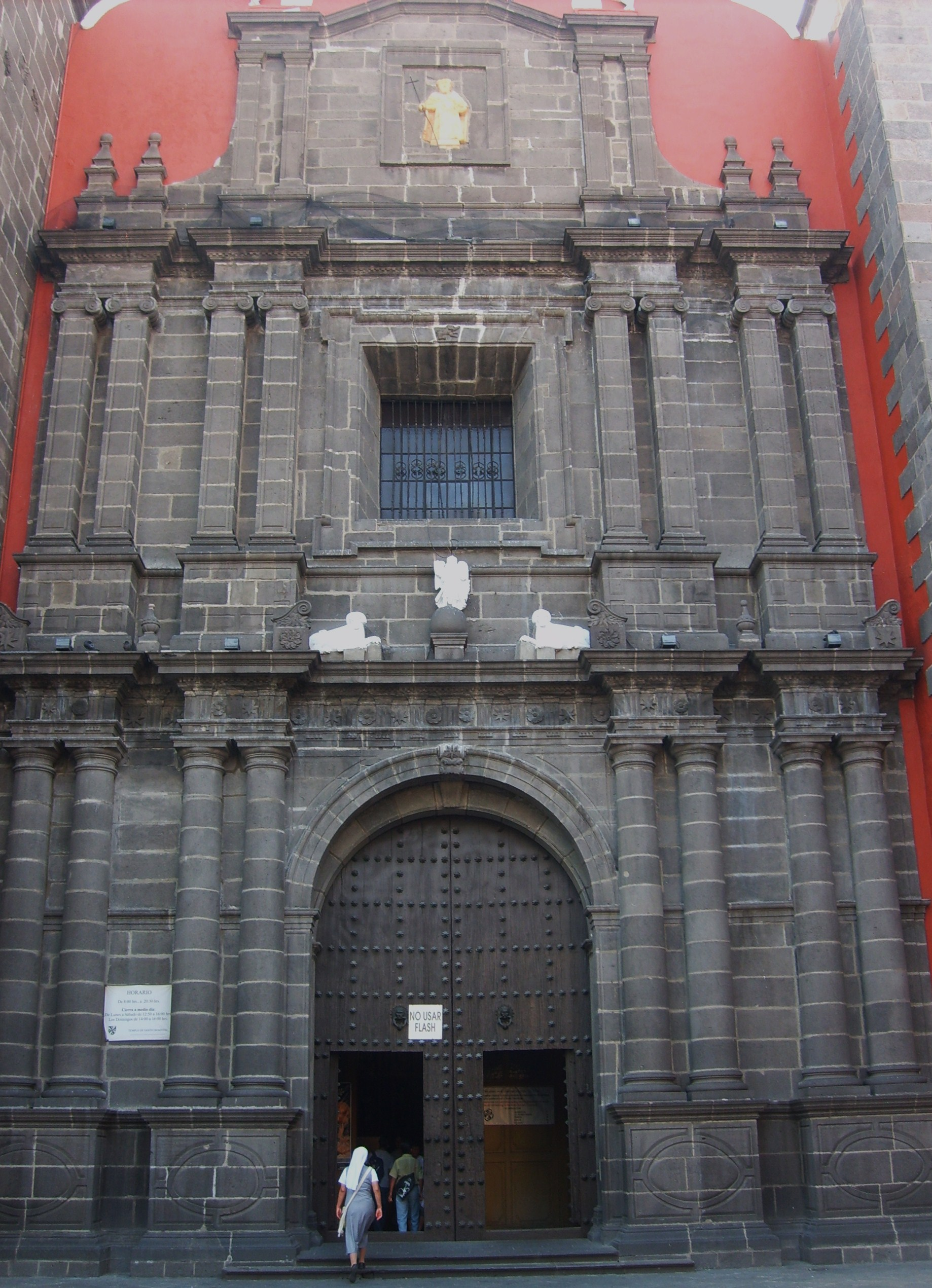 Portada del Templo y exconvento de Santo Domingo de Guzmán (Puebla)